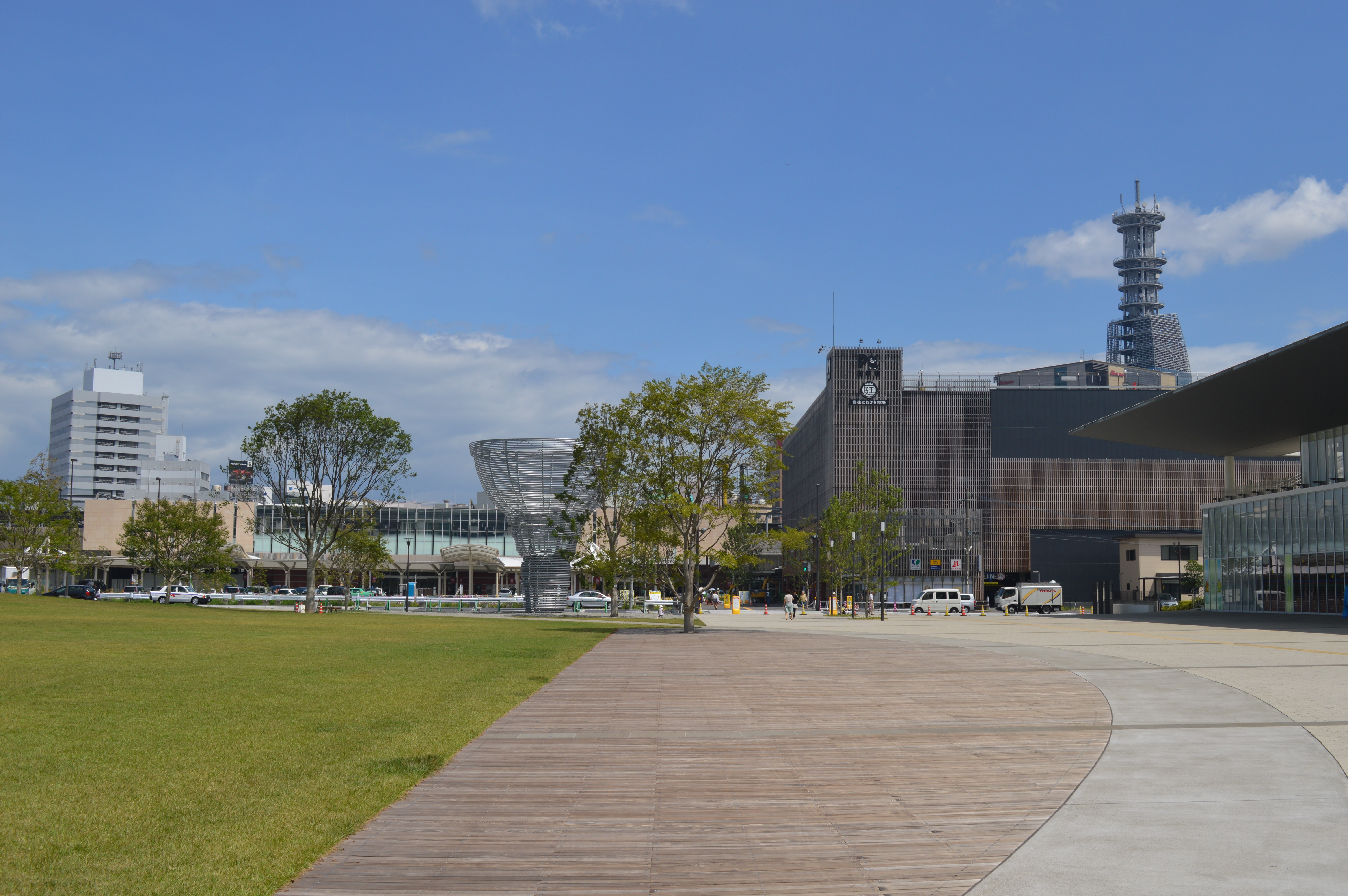 大分駅南口